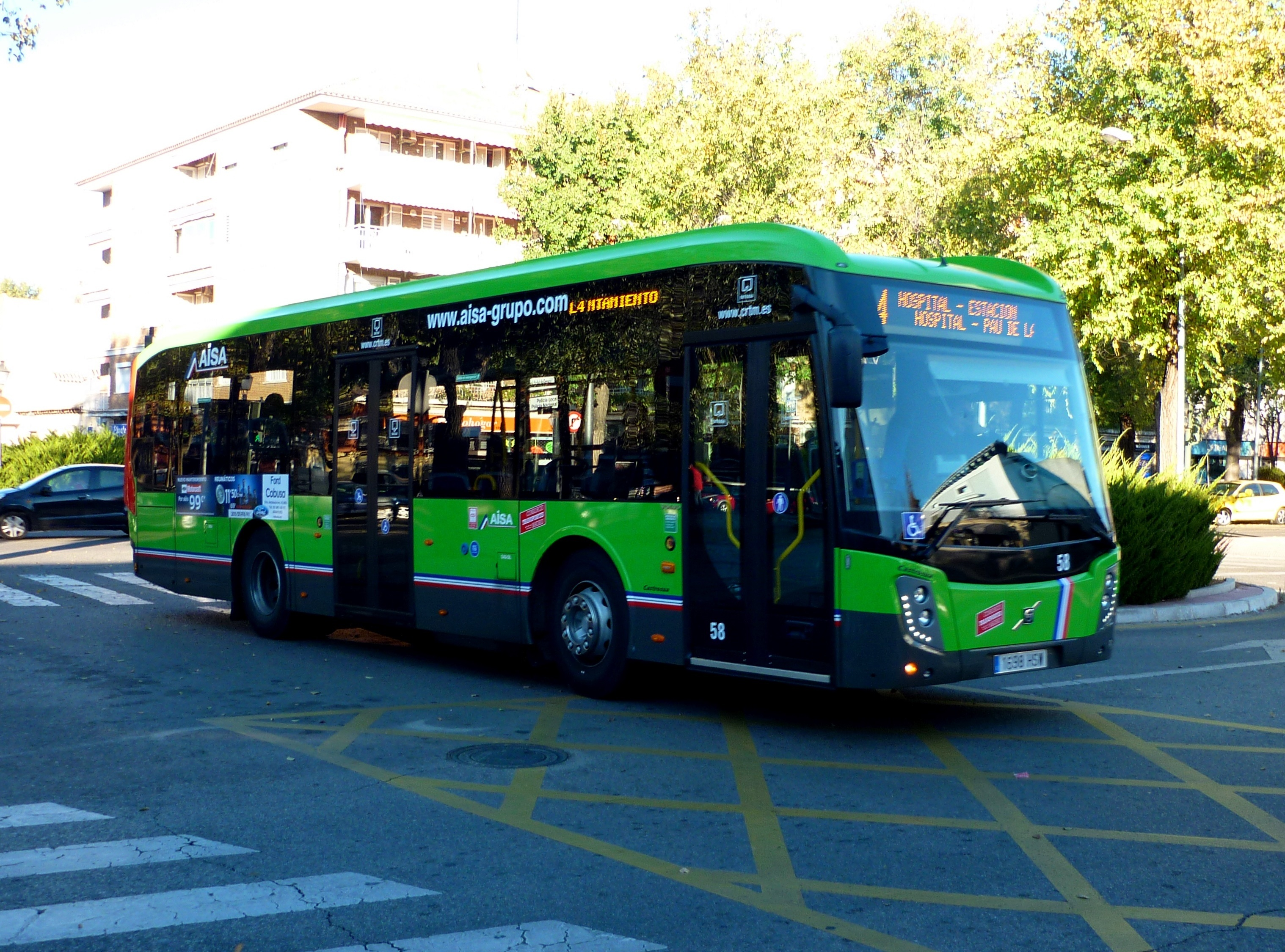 Mosamo - 58